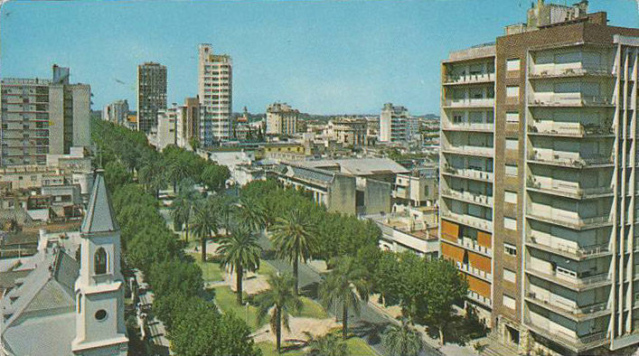 Panorámica del Boulevard Oroño en Rosario, Argentina. Desde la esquina de calle San Lorenzo, mirando al sur.